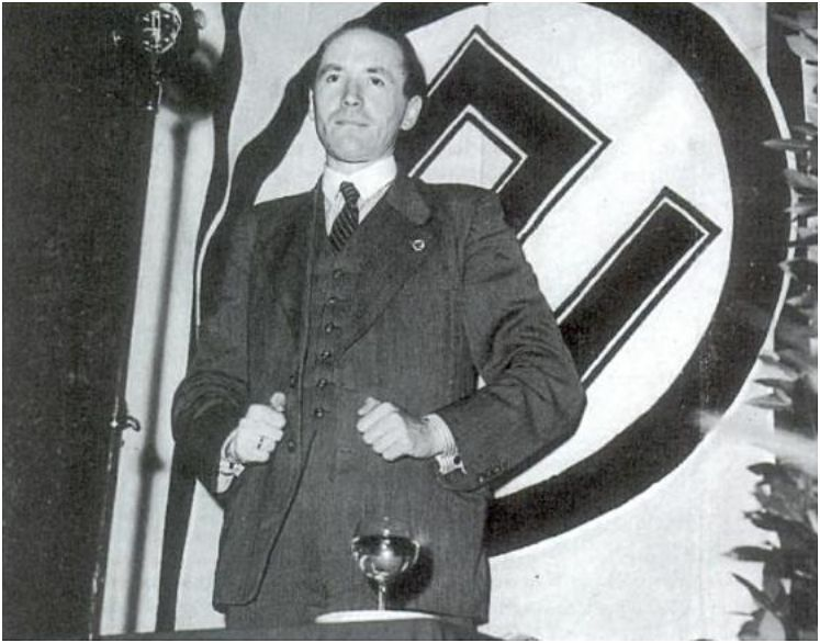 René Lambrichts voor de vlag van Volksverwering (Brussel, 17 juli 1942)